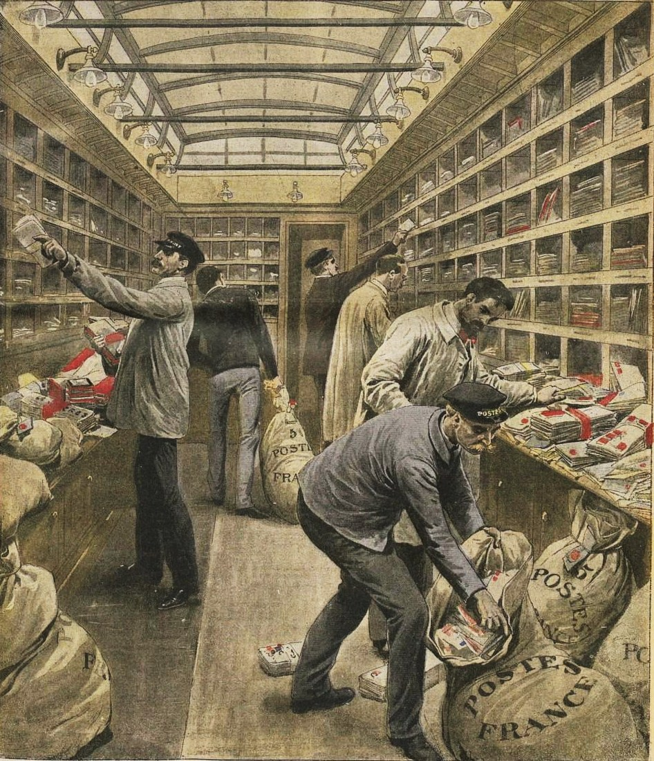 Intérieur d'un wagon postal français.